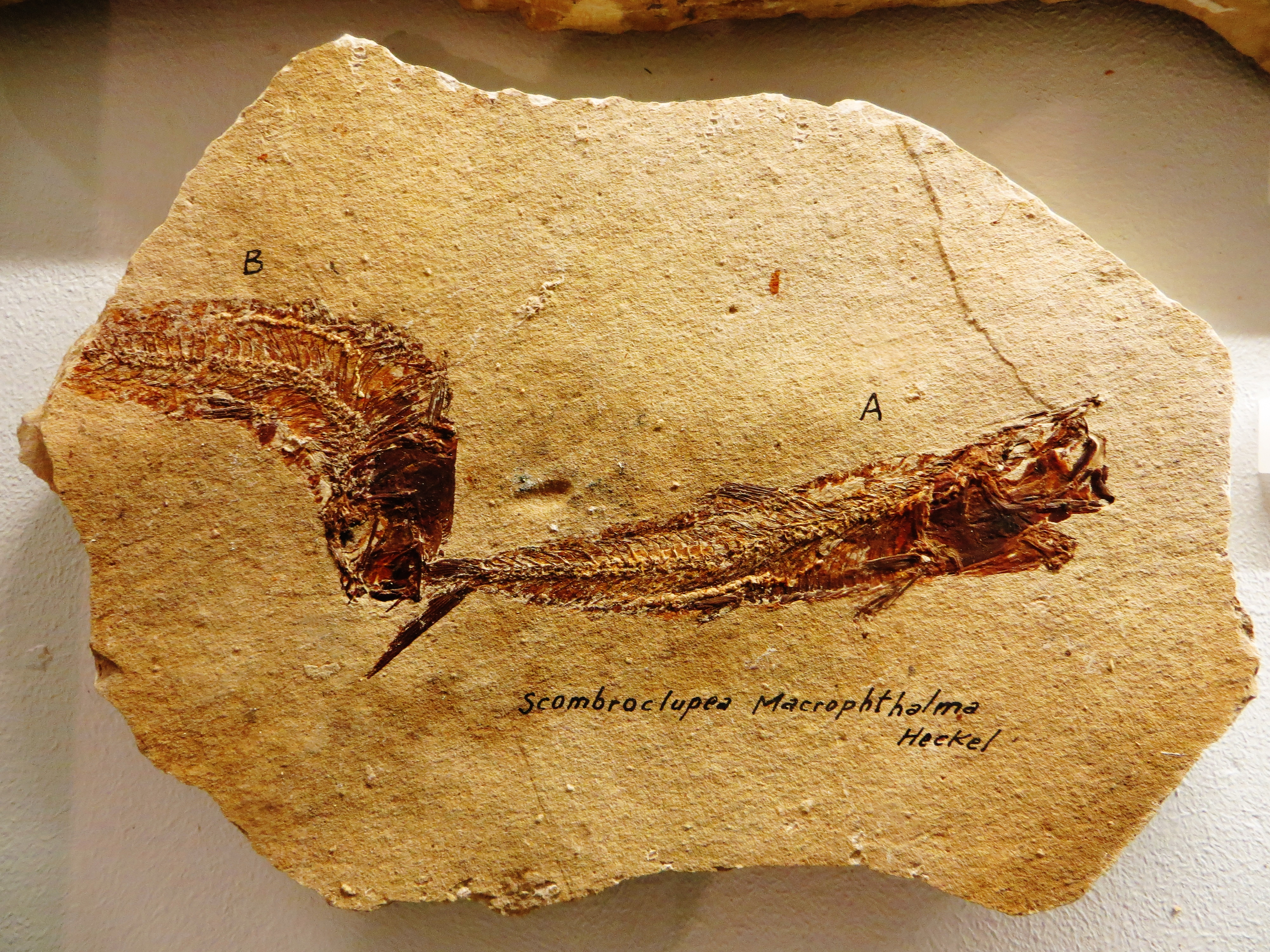 Fossil of Scombroclupea, an extinct fish- Took the picture at Museum of Paleontology, Tubingen